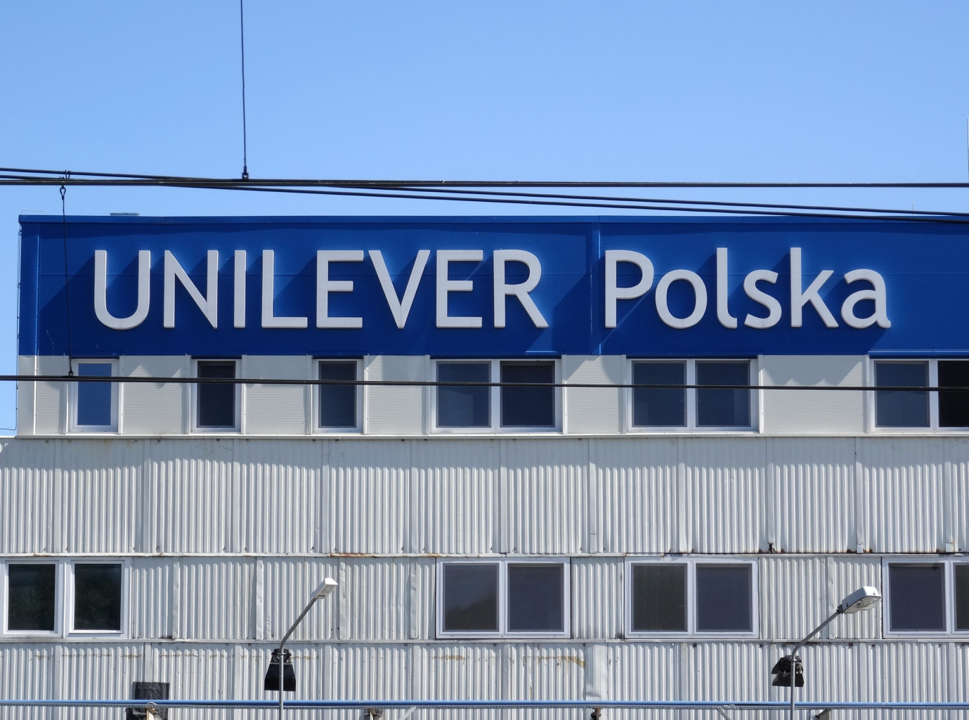 Fabryka Unilever S.A. przy ul. Kraszewskiego 20 w Bydgoszczy